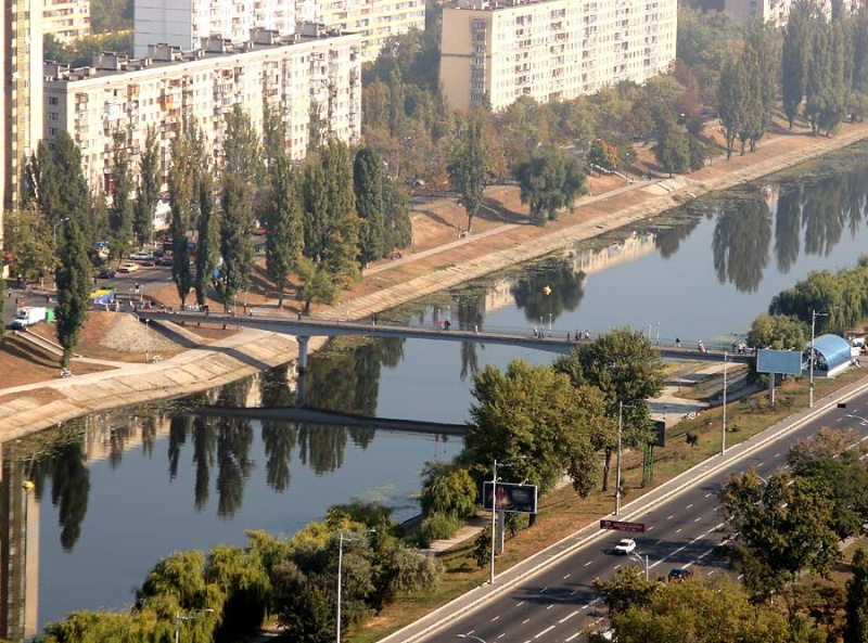 Пешеходный мост через Русановский канал, соединяющий бульвар Давыдова и проспект Воссоединения.